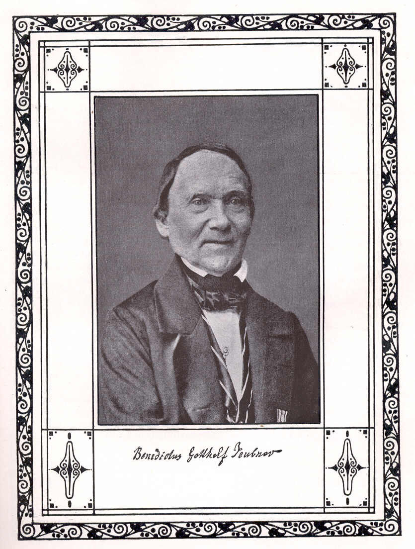 Benedictus Gotthelf Teubner (1784–1861), deutscher Verleger